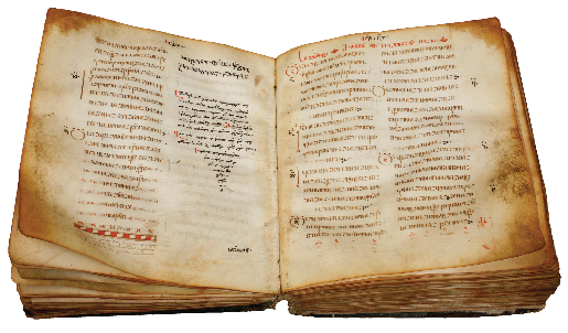 პარხლის ოთხთავი